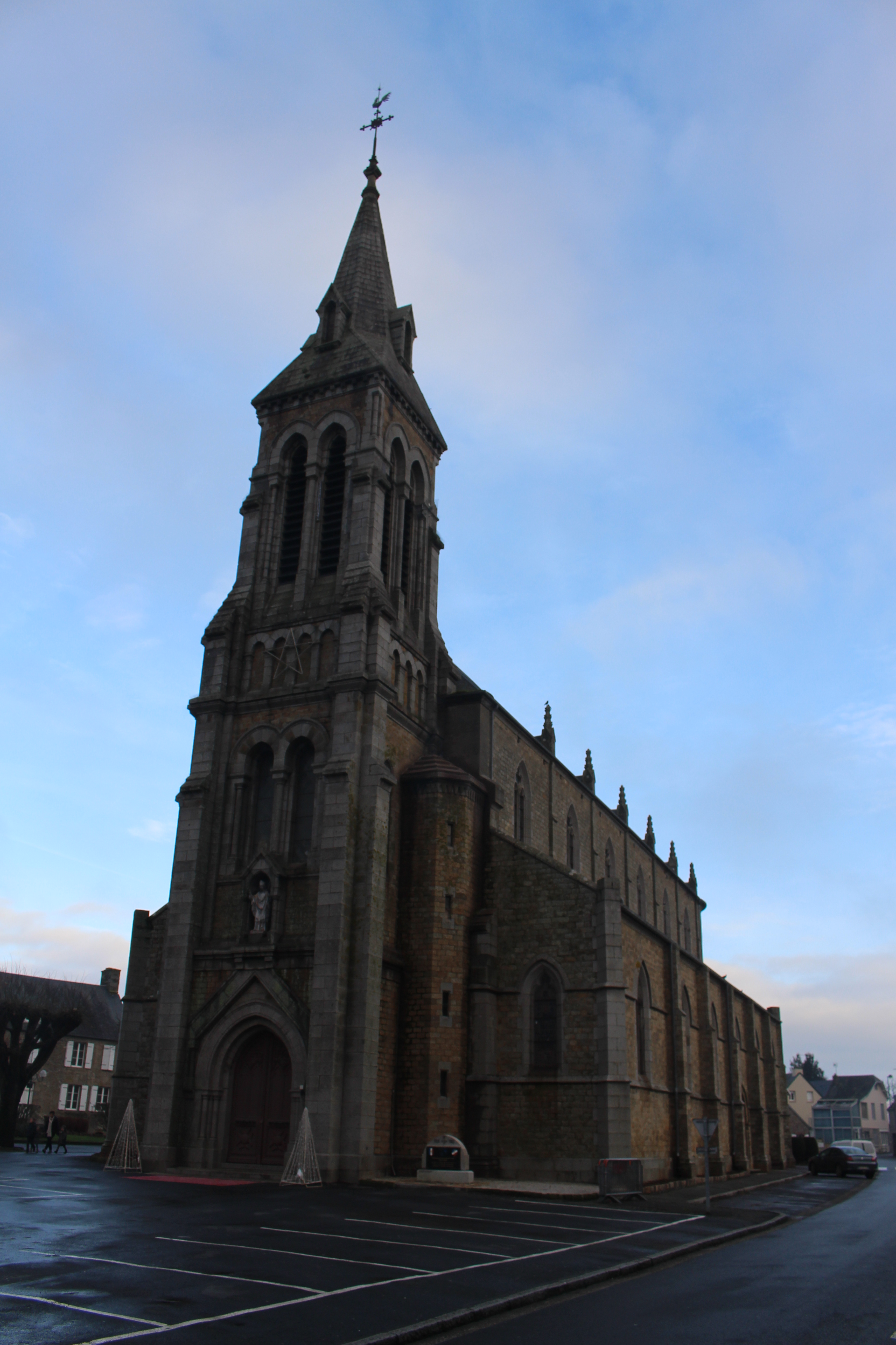 Sartilly, Manche